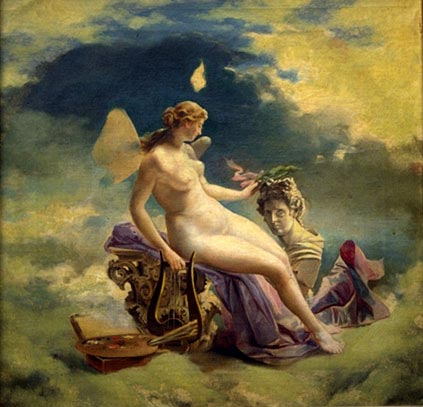 Boceto para el cuadro alegórico El arte, pintado en el Teatro Nacional de Costa Rica